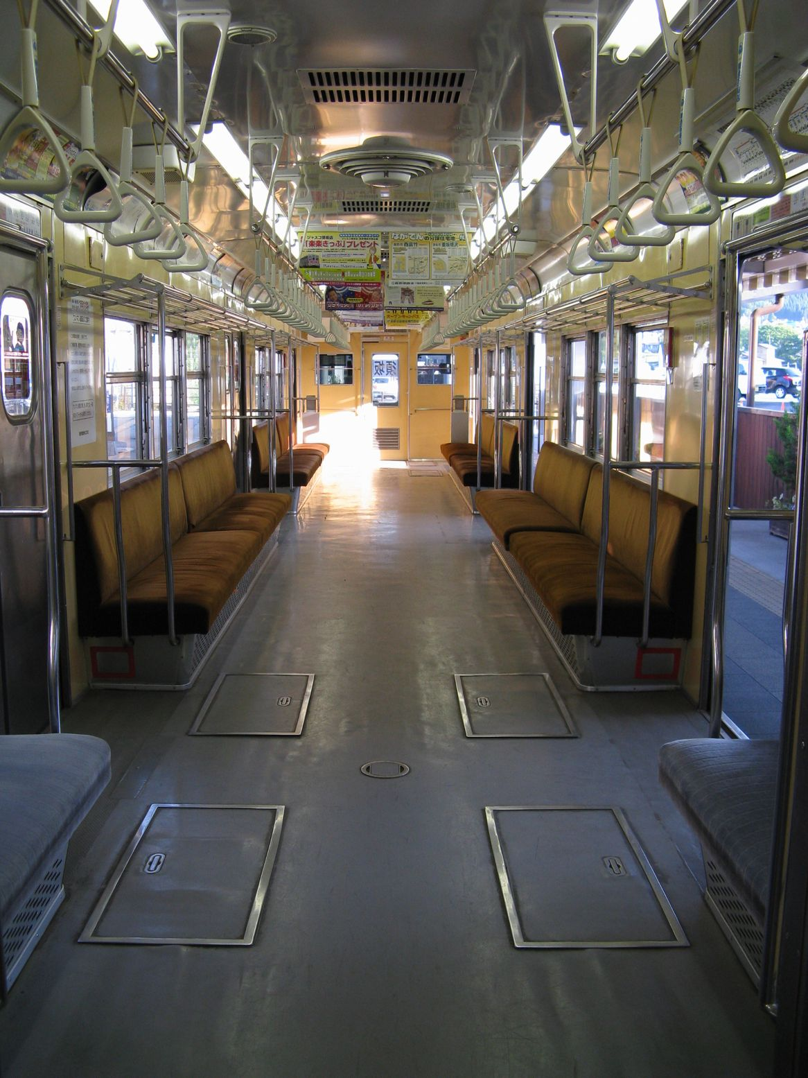 長野電鉄3500系電車 モハ3521（O編成）車内 湯田中にて